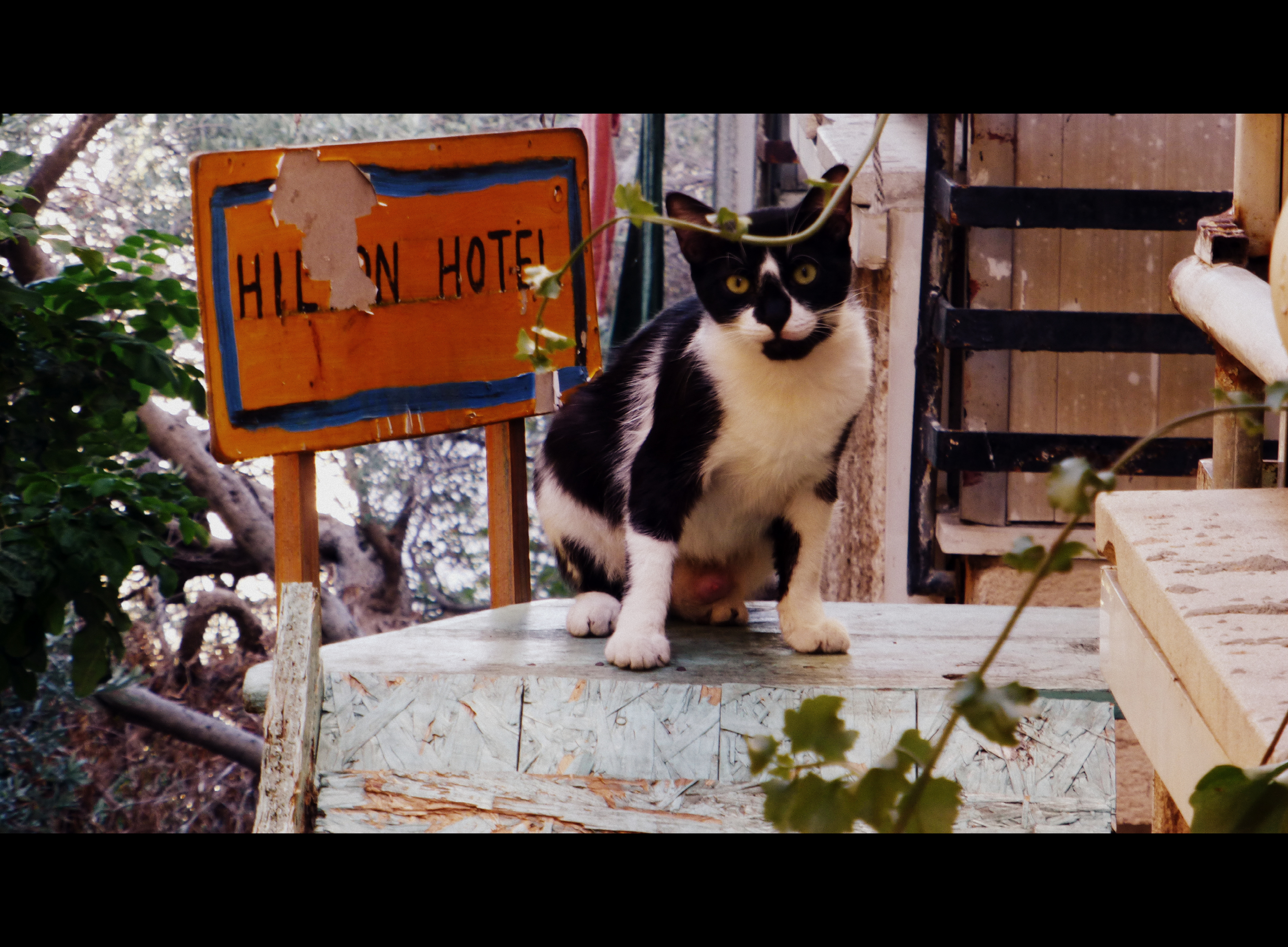 בית הזכוכית בחיפה